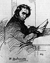 Self-portrait